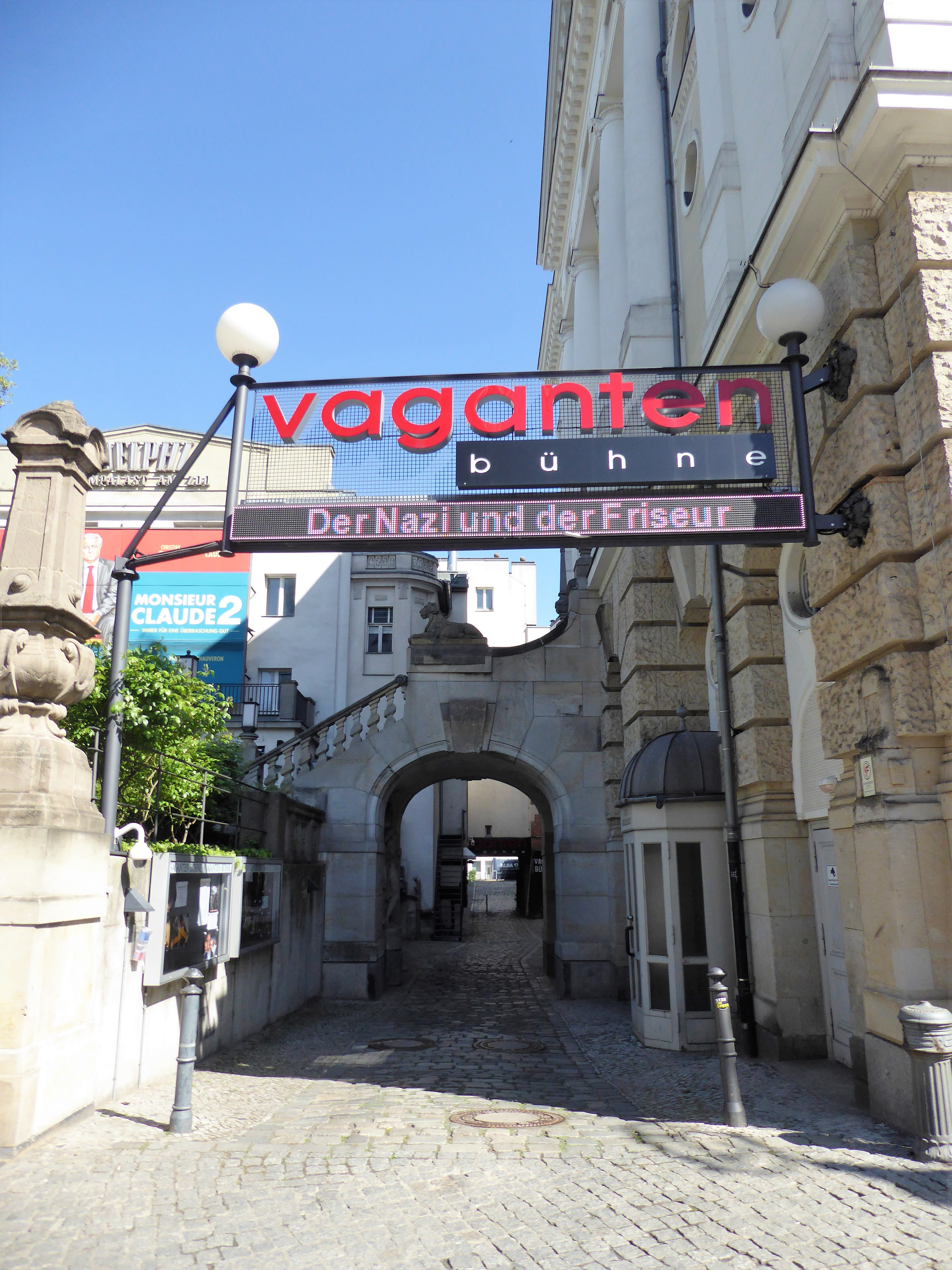 Charlottenburg Vaganten Bühne Zugang von der Kantstraße